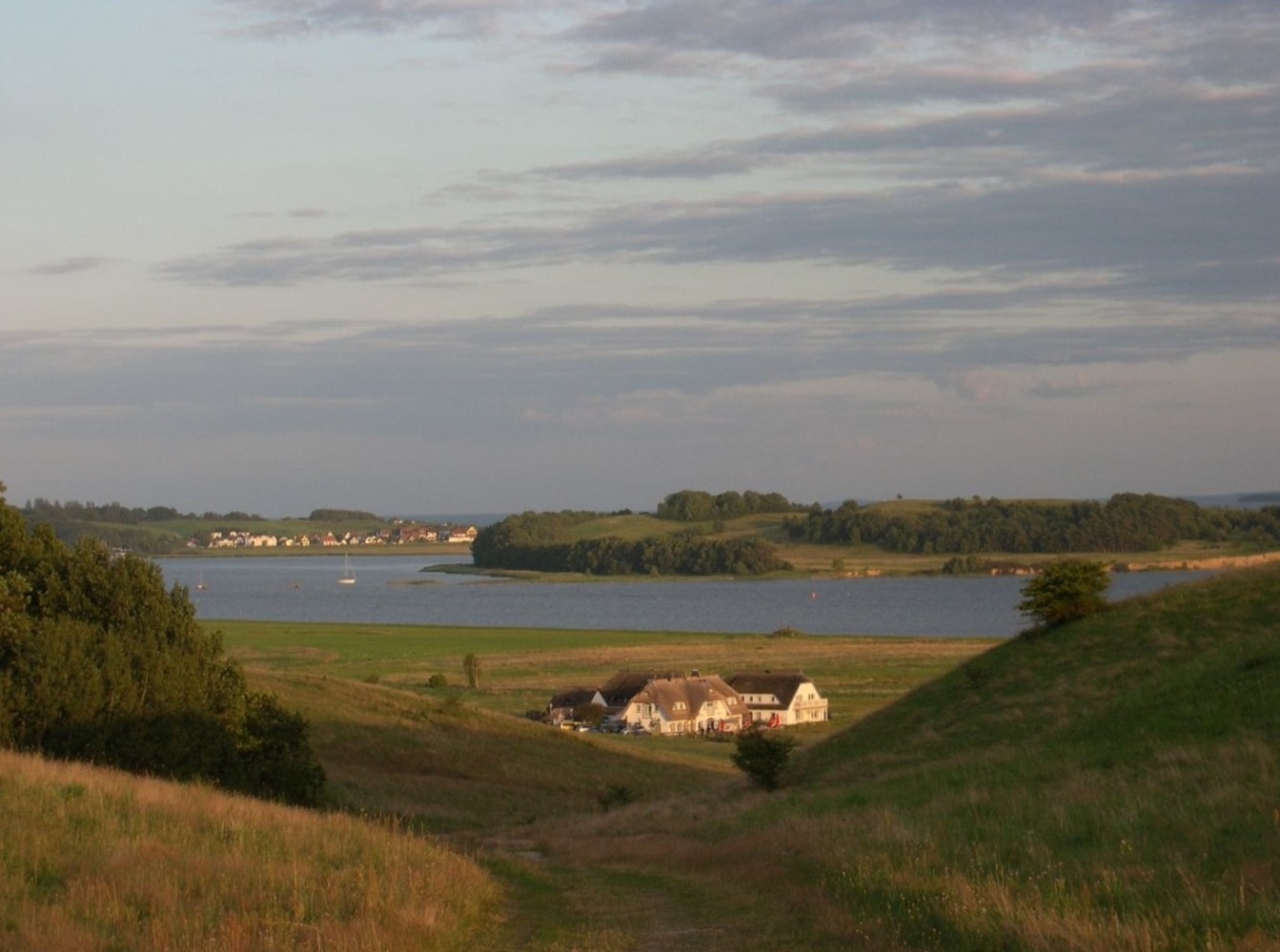 Boddenlandschaft auf Mönchgut mit den westlichsten Häusern von Groß Zicker (Vordergrund), der Halbinsel Klein Zicker (Hintergrund rechts) und dem Ort Thiessow (Hintergrund links)